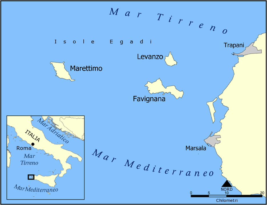 ricavata da Aegadian Islands blank map.png